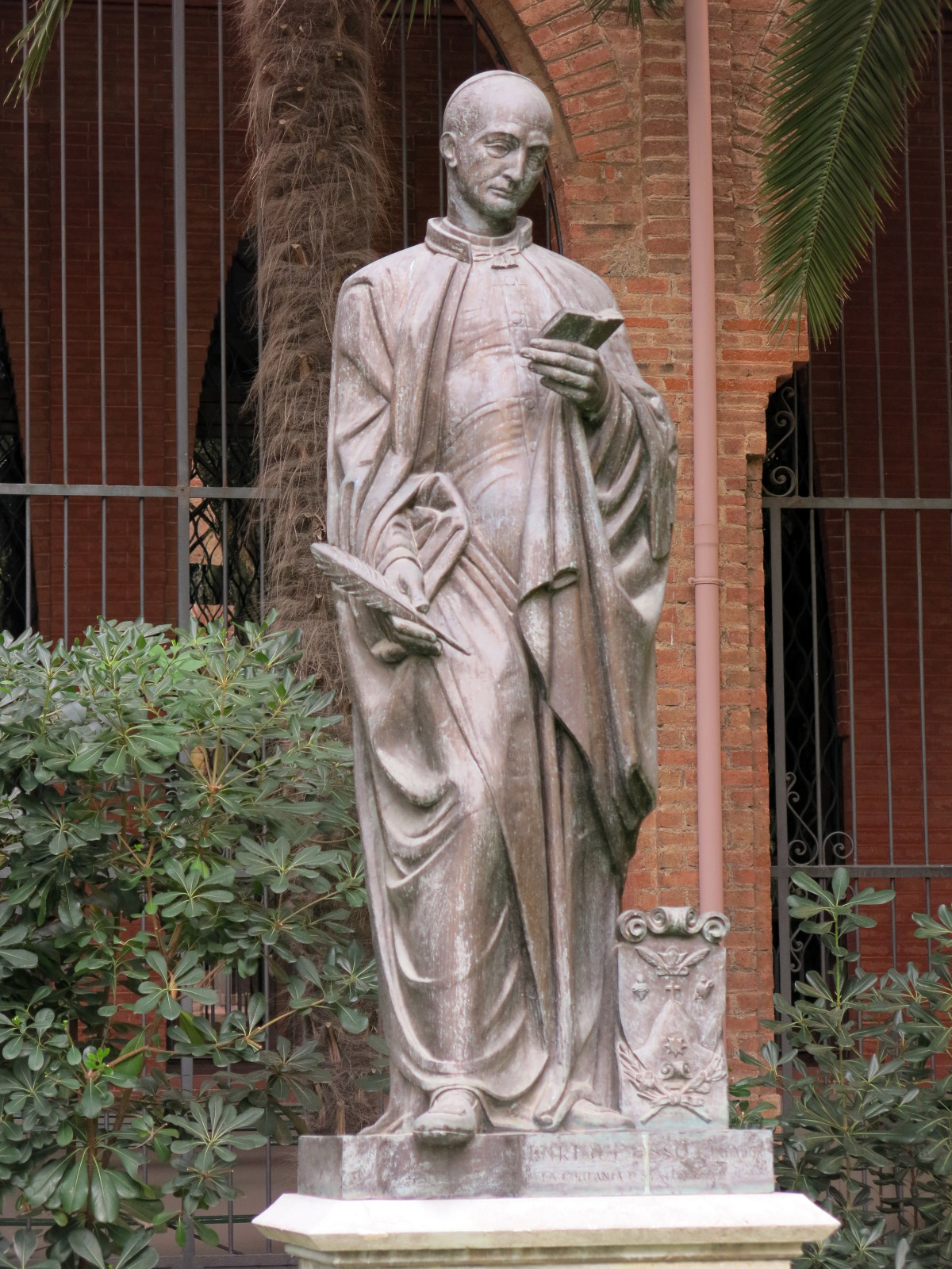 Col·legi Teresià (Barcelona)